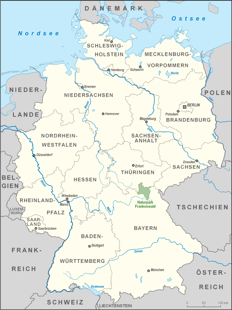 Karte des Naturparks Frankenwald in Deutschland